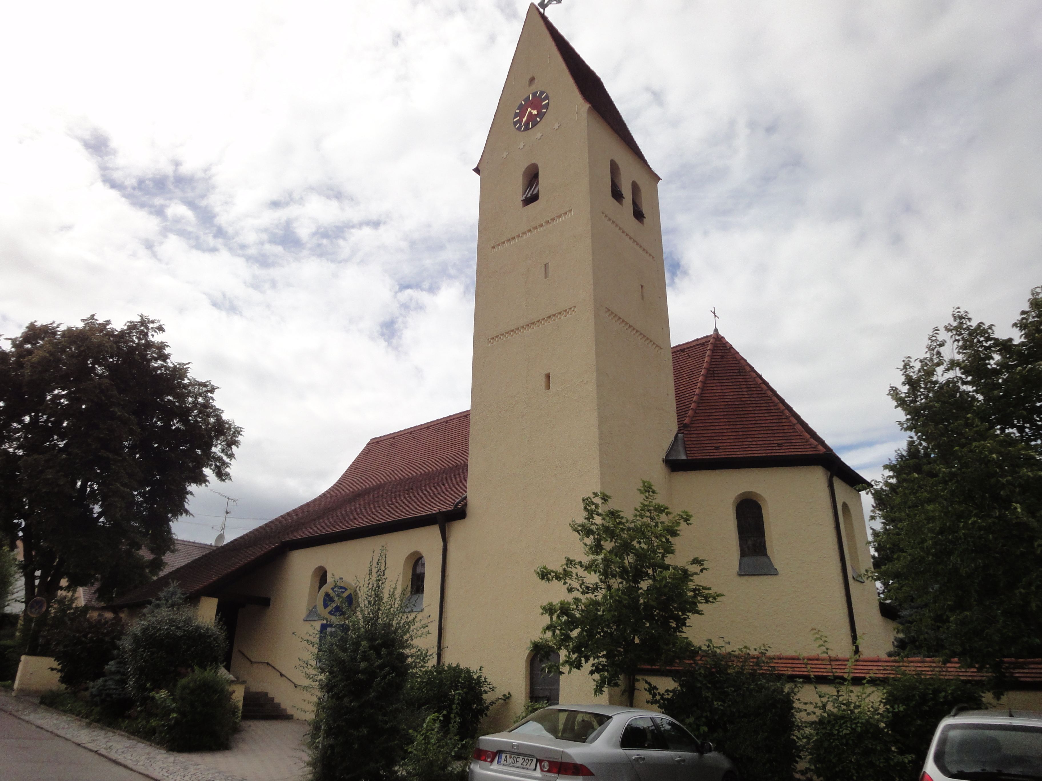 Evang.-Luth. Bekenntniskirche in Gersthofen, Saalbau mit eingezogenem Chor und südlichem Satteldachturm, von German Bestelmeyer, 1934/35.